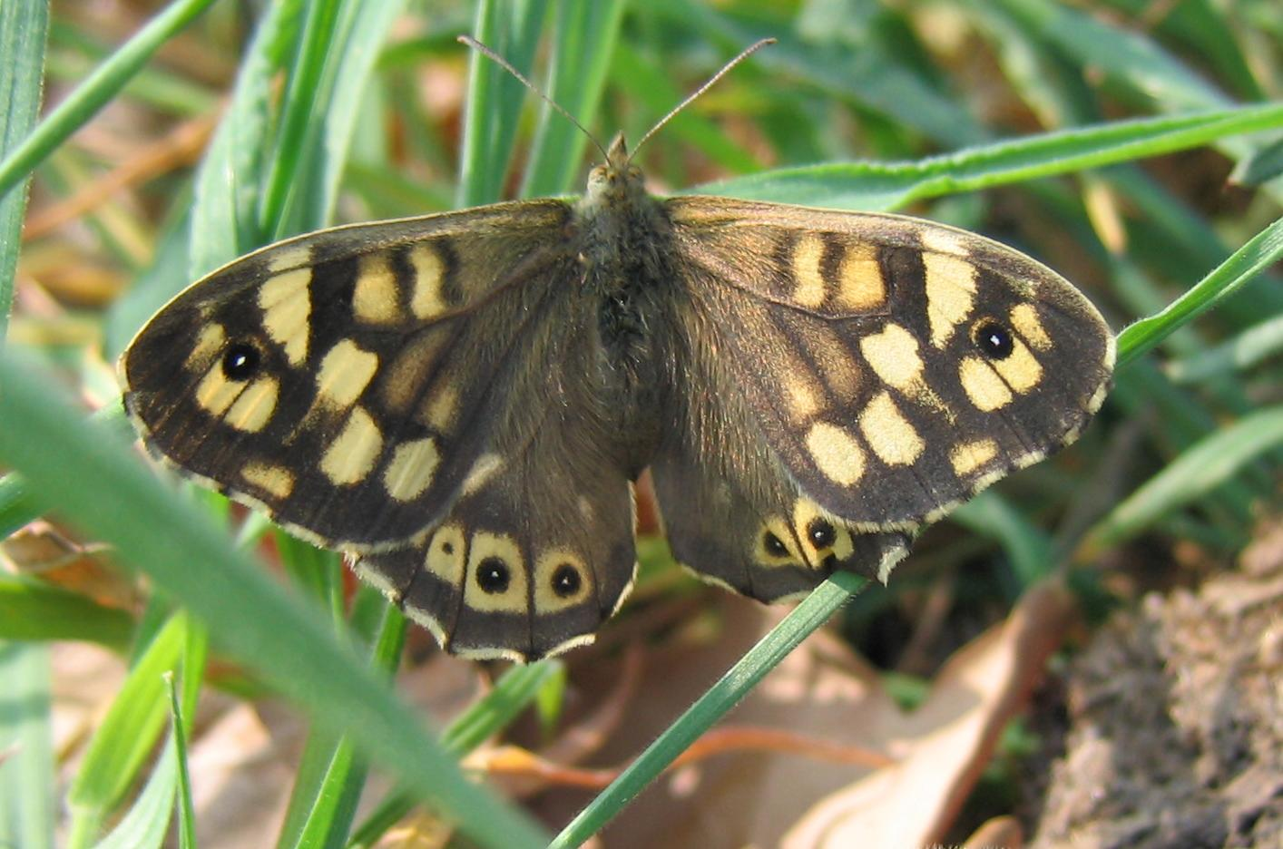 Waldbrettspiel, Pararge aegeria, Groß Machnow, Brandenburg